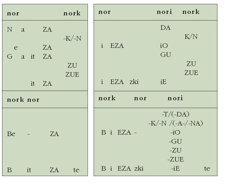 EZAN aditzaren aginteraren paradigma